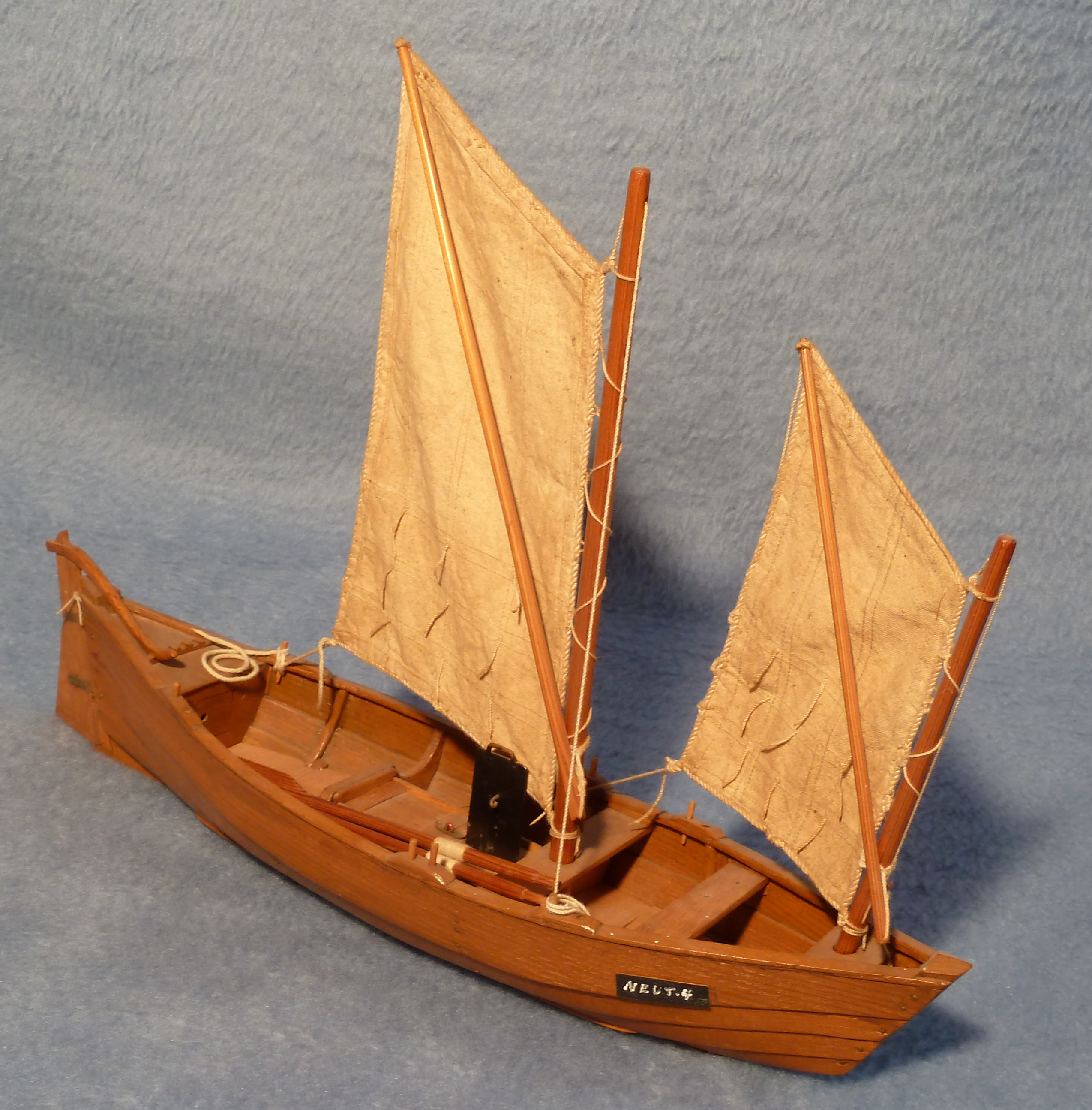 Foto Modell eines Sicken